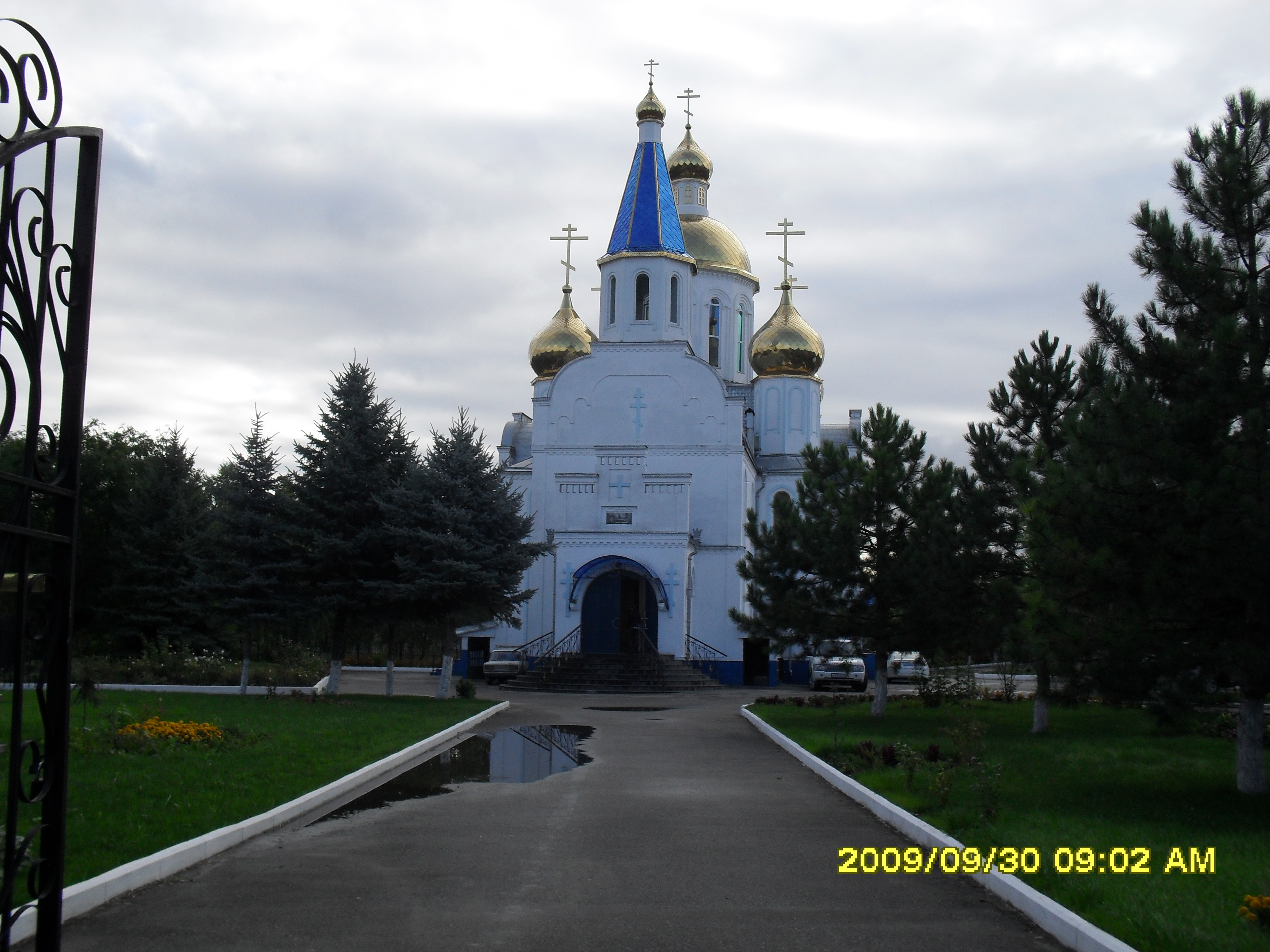 Церковь Успения Пресвятой Богородицы в станице Ессентукская